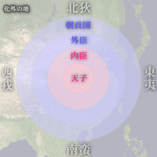 漢代の華夷秩序に基づく天下の概念図。 文献を参照しながら、投稿者自身が作成。